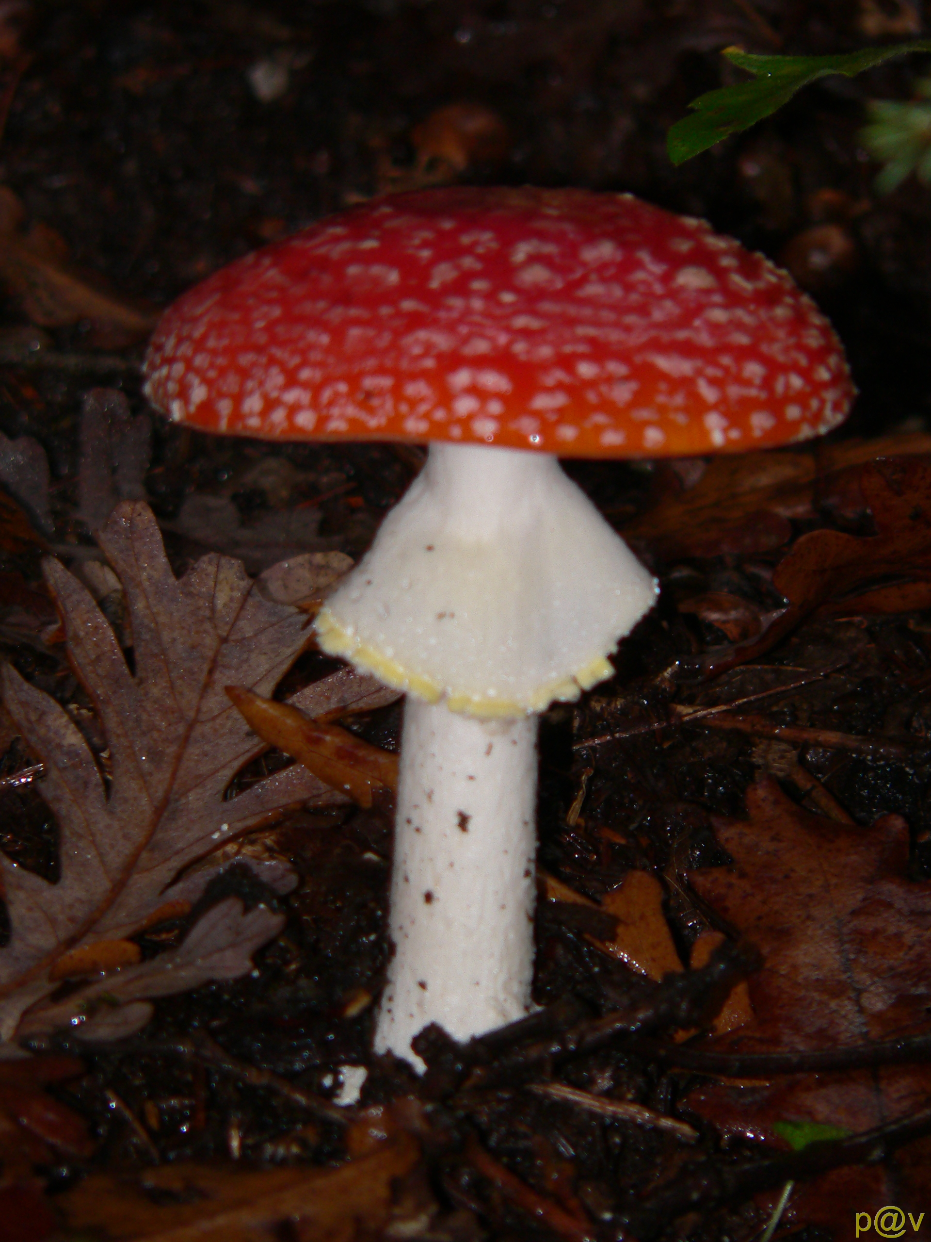 Μανιταρια